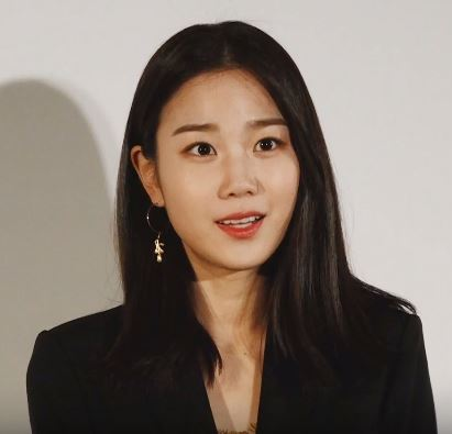 배우 장희령, 고성희가 26일 오후 서울 강남구 논현동 인터와이어드 스튜디오에서 열린 제인송(jain song) 19F/W 컬렉션에 참석했다.